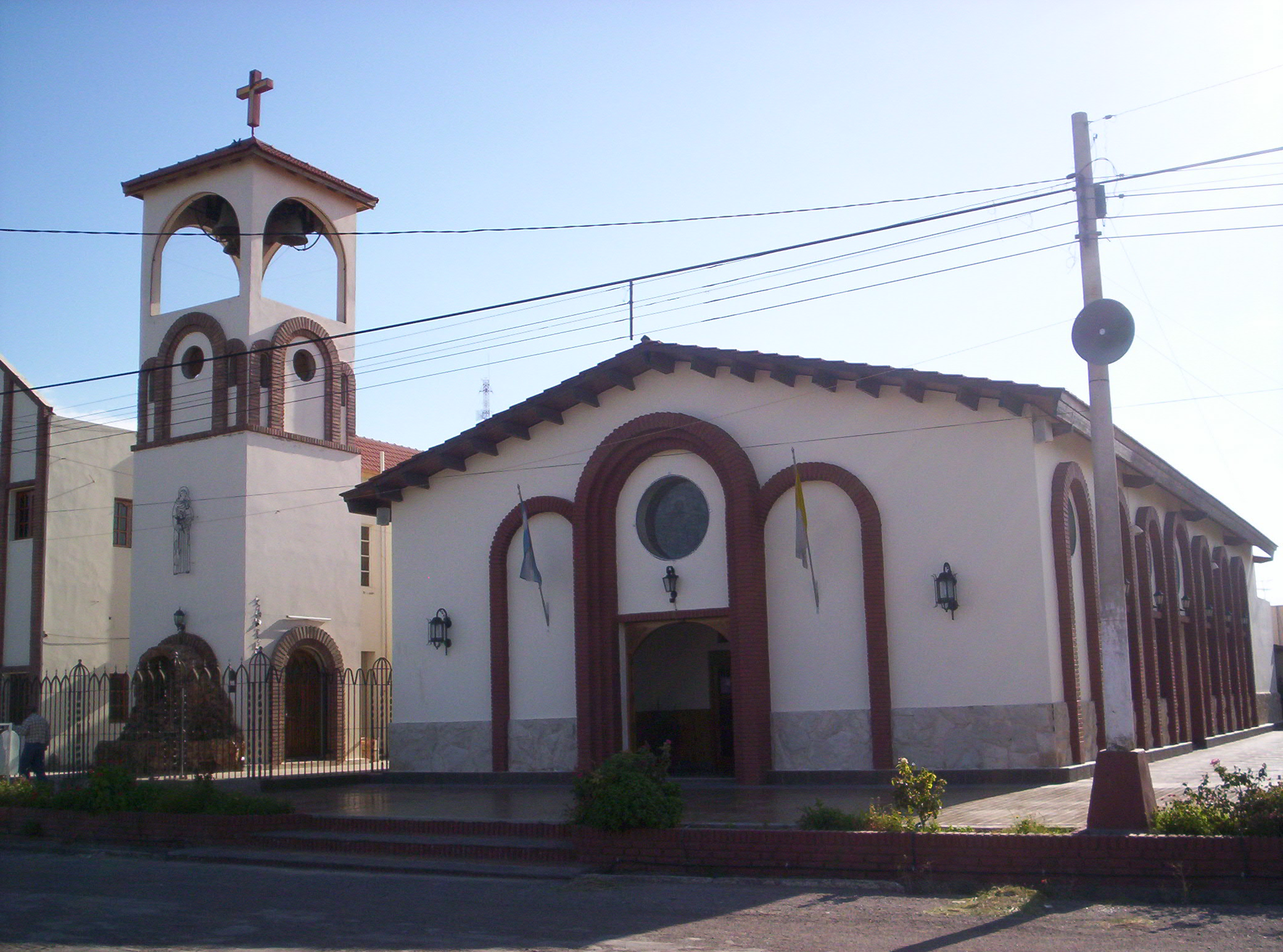 Iglesia de San Antonio de Padua, ubicada en la localidad de Media Agua departamento Sarmiento, provincia de San Juan, Argentina Church of St. Anthony of Padua, located in Media Agua department Sarmiento, San Juan Province, Argentina